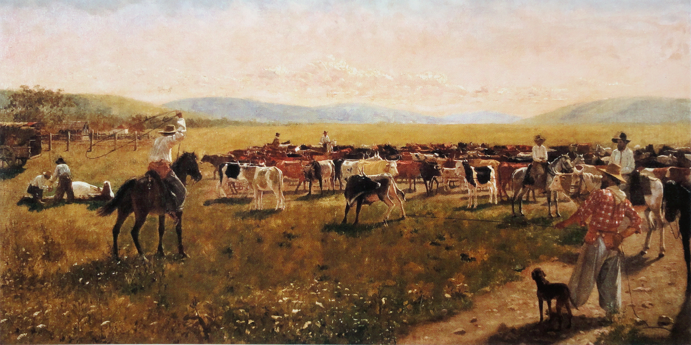 Peões laçando gado, óleo sobre tela, 50 x 100 cm